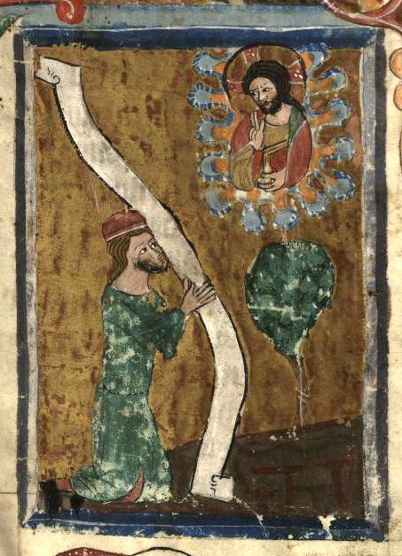 Rudolf von Ems: Weltchronik. Böhmen (Prag), 3. Viertel 14. Jahrhundert. Hochschul- und Landesbibliothek Fulda, Aa 88. Bildbeschreibung nach Martin Roland. Miniatur 1 1r Der Dichter (?) kniet vor Gott